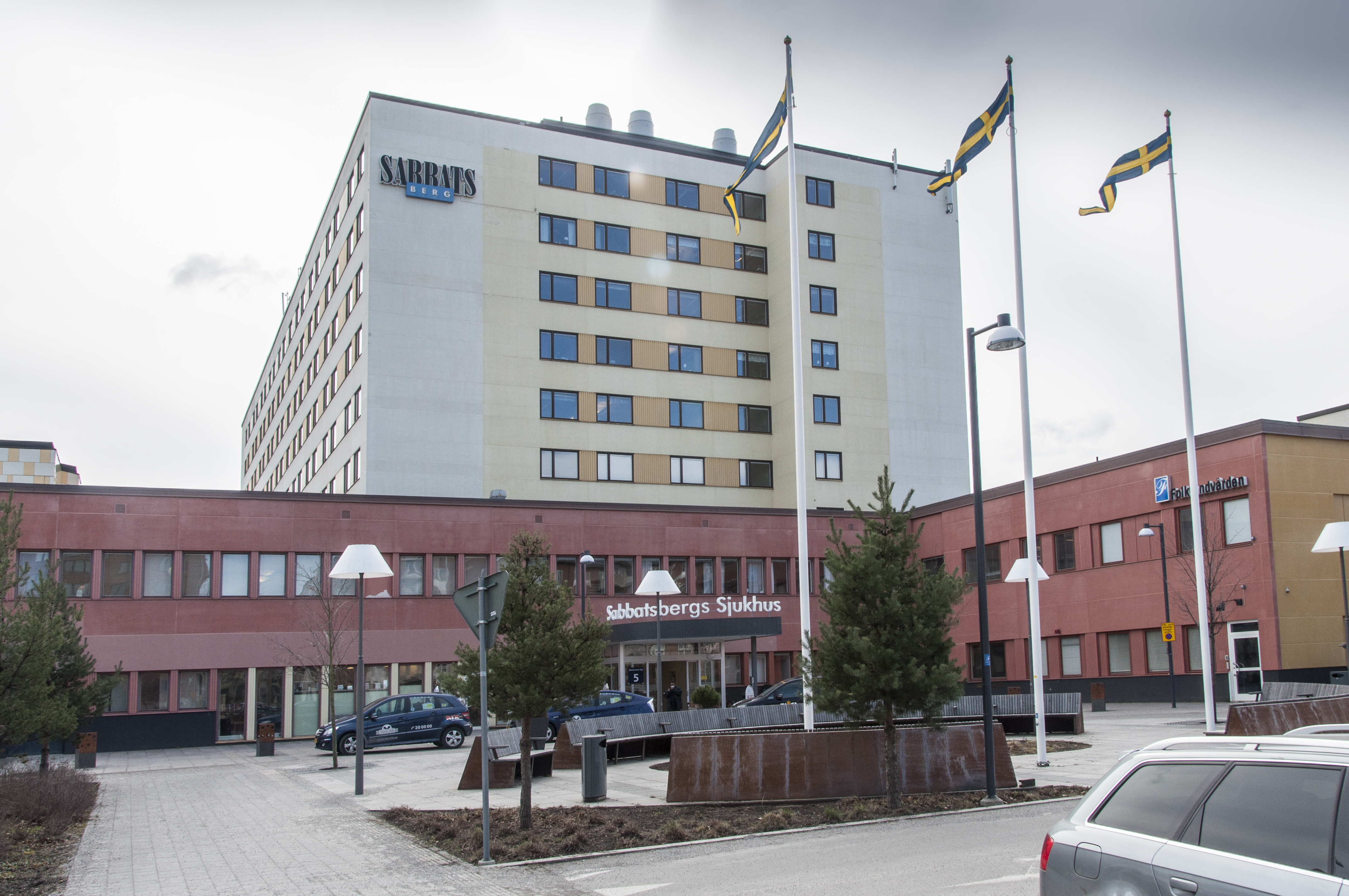 Byggnadsår 1967-70, arkitekter Uddenberg & Hjelm-Jensen, byggherre Sabbatsbergssjukhus.